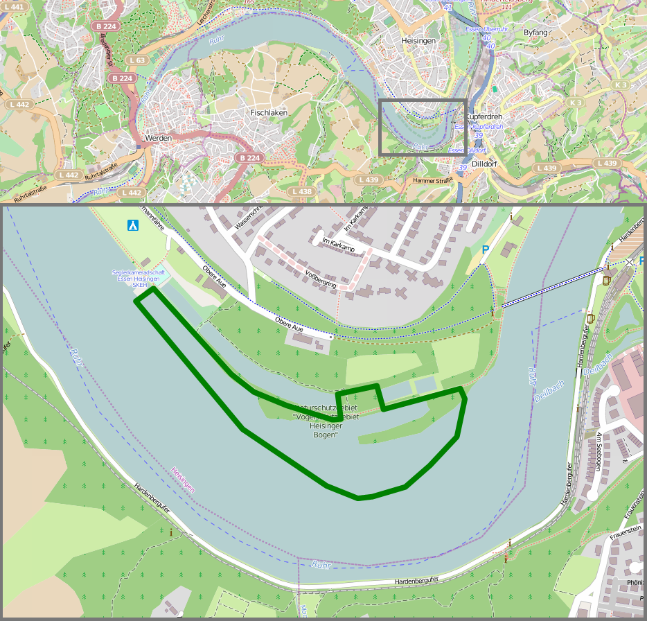 Naturschutzgebiet Vogelschutzgebiet Heisinger Bogen (E-011) – Karte